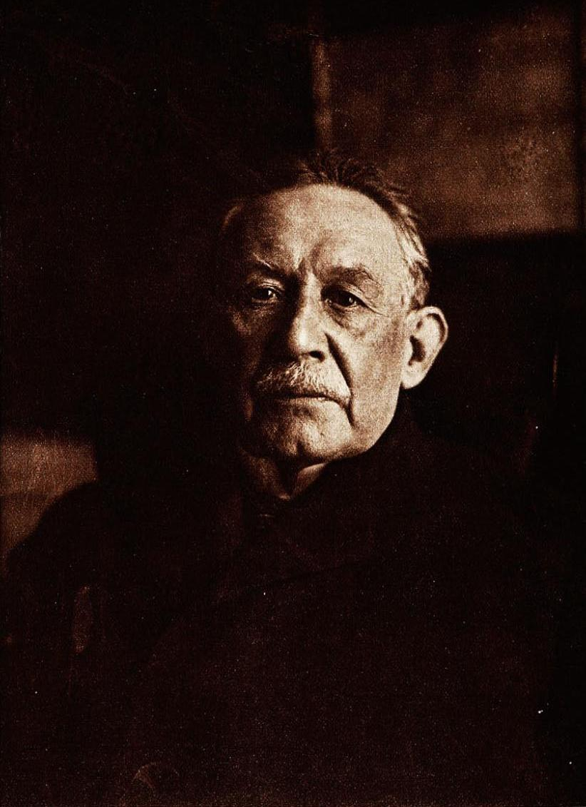 Gonzalo Bulnes Pinto (Santiago, 19 de noviembre de 1851 - ibídem, 17 de agosto de 1936) fue un agricultor, historiador, miembro del Partido Conservador y político chileno.